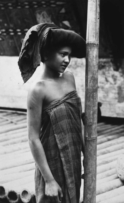 Foto. Portret van een jonge Karo Batak vrouw